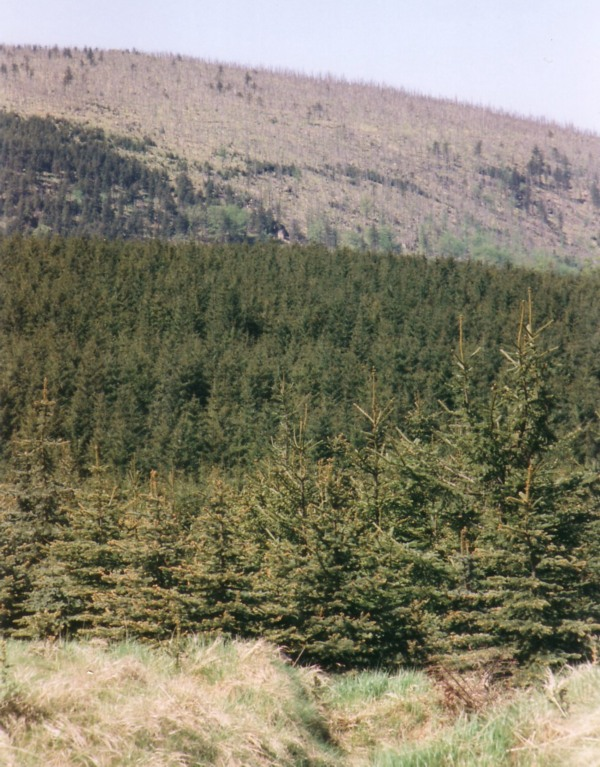 Neuartige Waldschäden („Waldsterben“): Großflächig abgestorbene Fichten im tschechischen Erzgebirge auf gut 1000 m Höhe